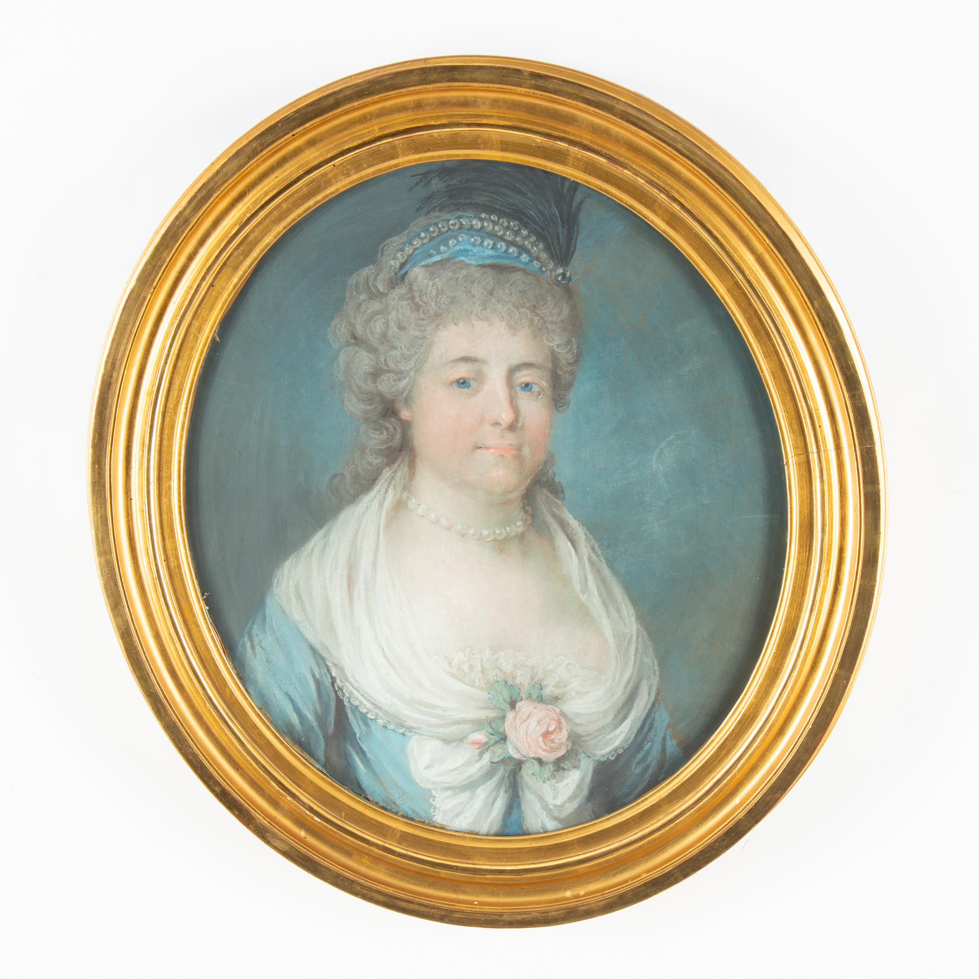 Porträtt av Ulrika Elisabeth Taube (1755-1816), gift med generalen Nils Mannerskantz. Porträtt troligen från 1790-talet av okänd konstnär.